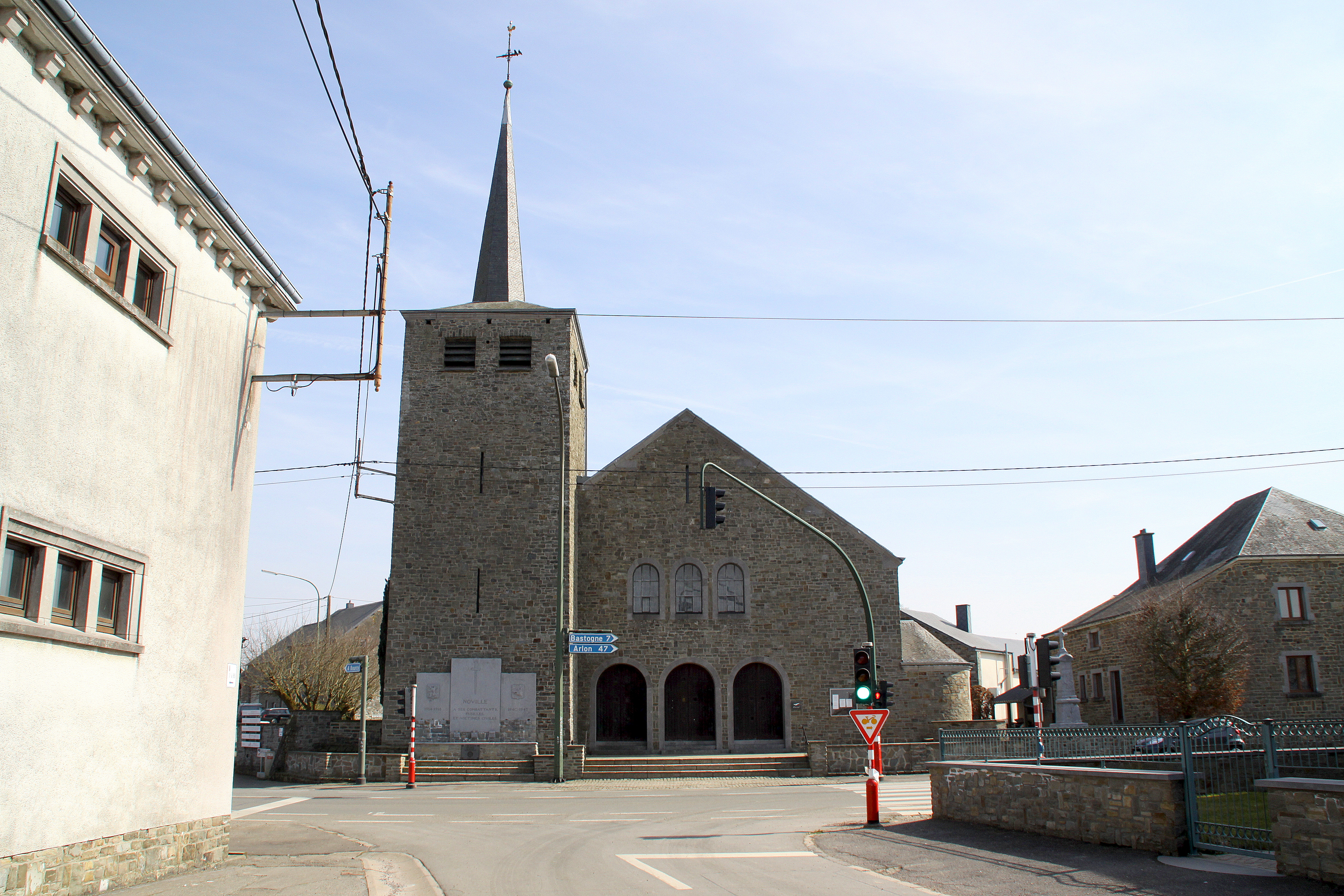 D'Kierch vun Noville